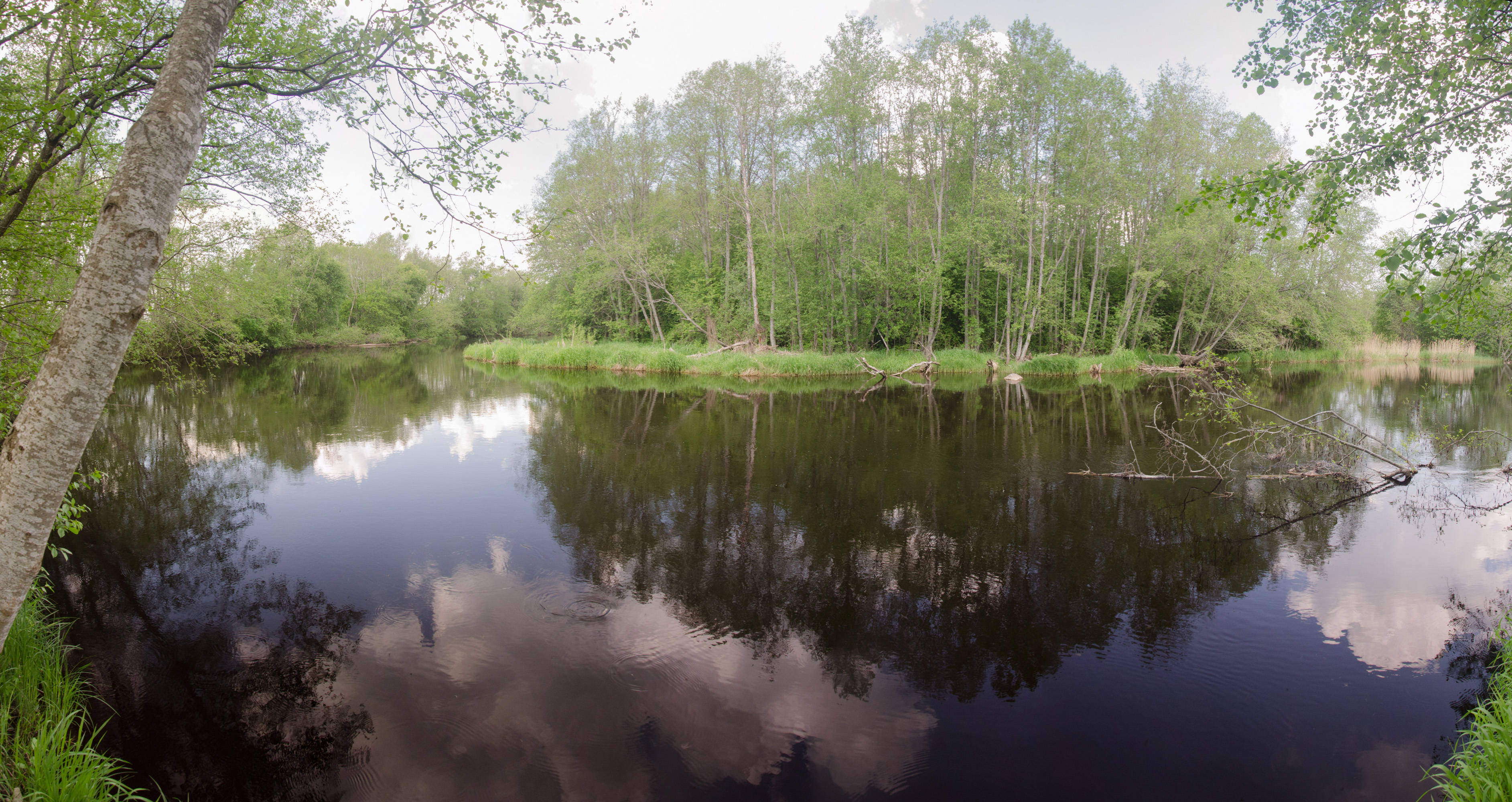 Panoraam Gabrieli poolsaarest